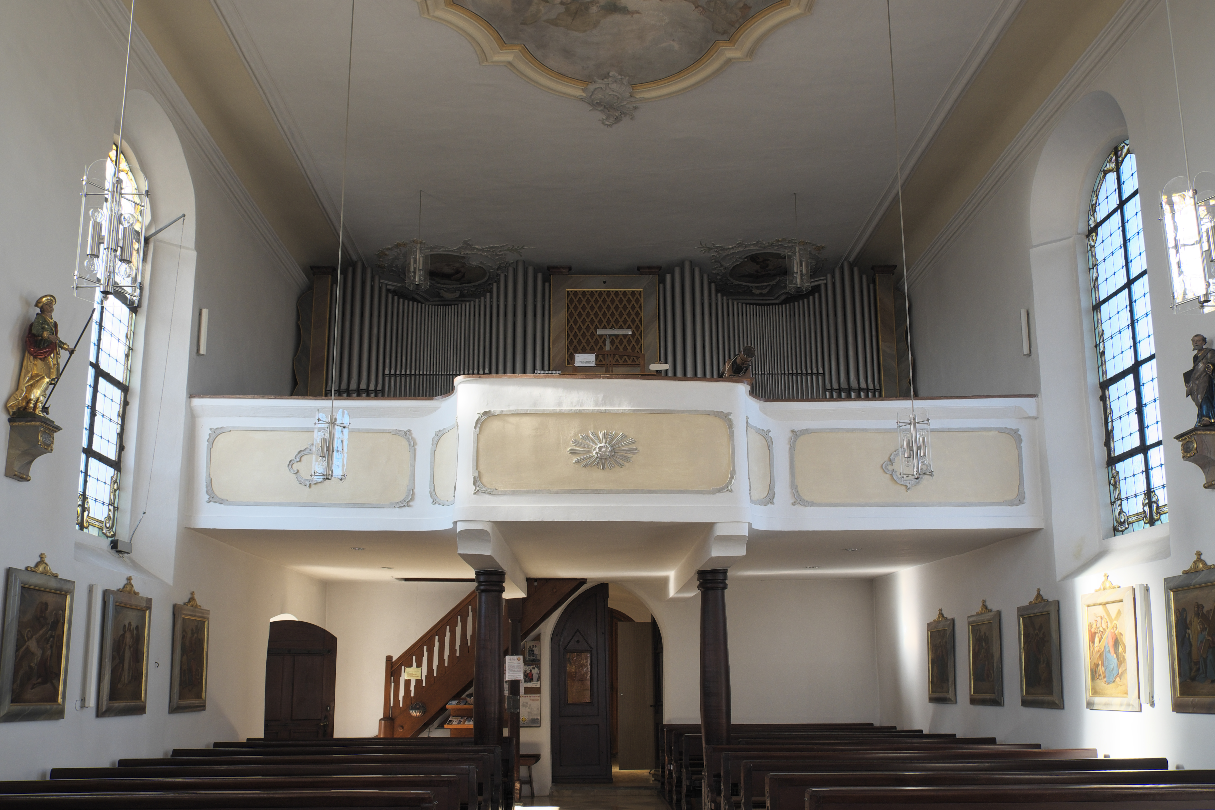 Katholische Pfarrkirche St. Georg in Hailtingen (Dürmentingen) im Landkreis Biberach (Baden-Württemberg/Deutschland), Empore